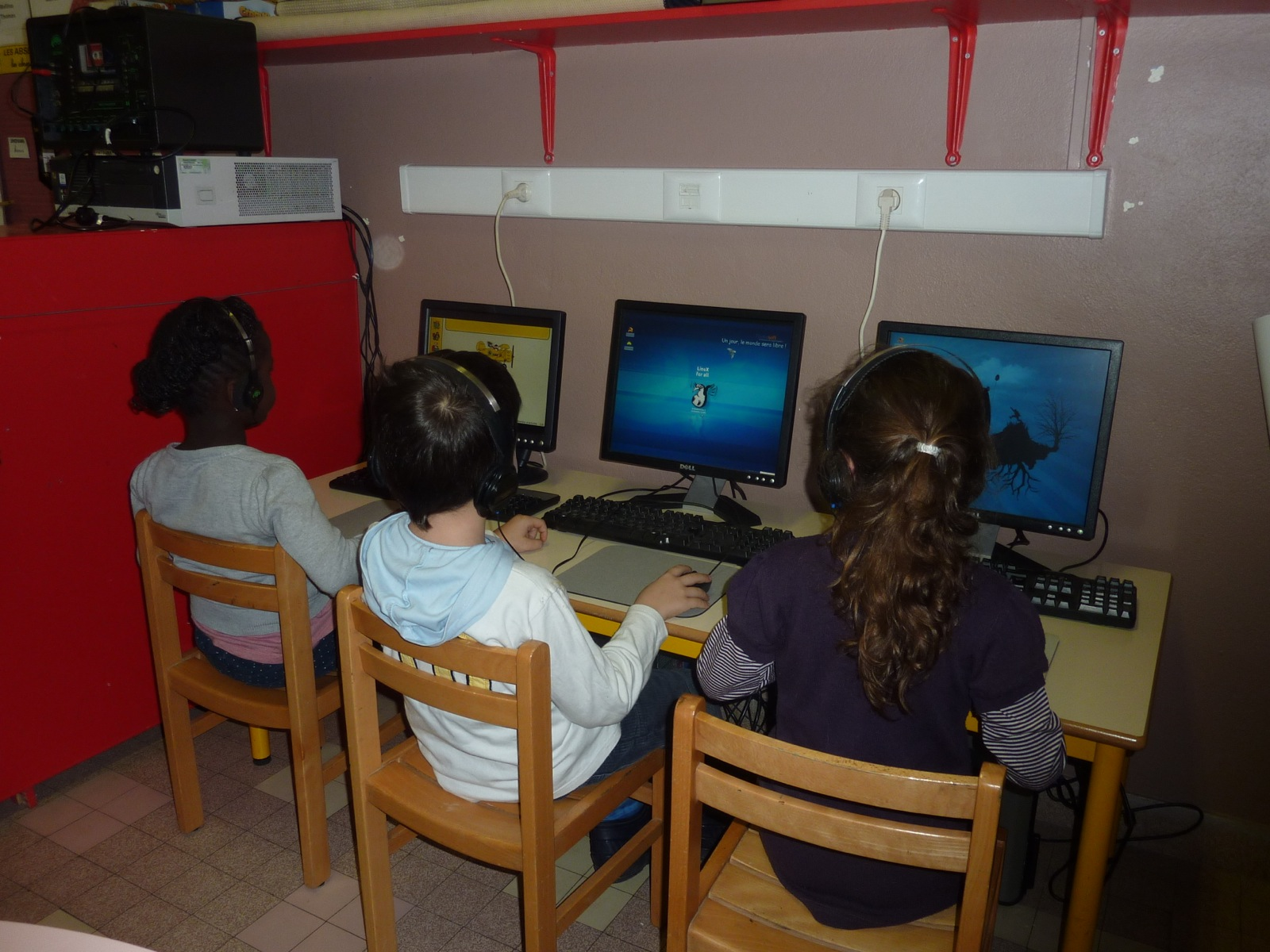 Trois postes informatiques dans une classe de Grande Section d'une école maternelle de St Martin d'Hères (Isère - France). Les trois postes sont équipés de la distribution Emmabuntüs 2 (version 12.04.3-1.06).